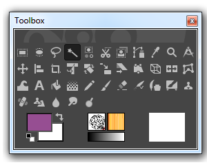 गिम्पची साधनपेटी